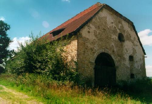 Antoinettenburg in Rheder bzw. zwischen Rheder und Erkeln, Brakel, Kreis Höxter.